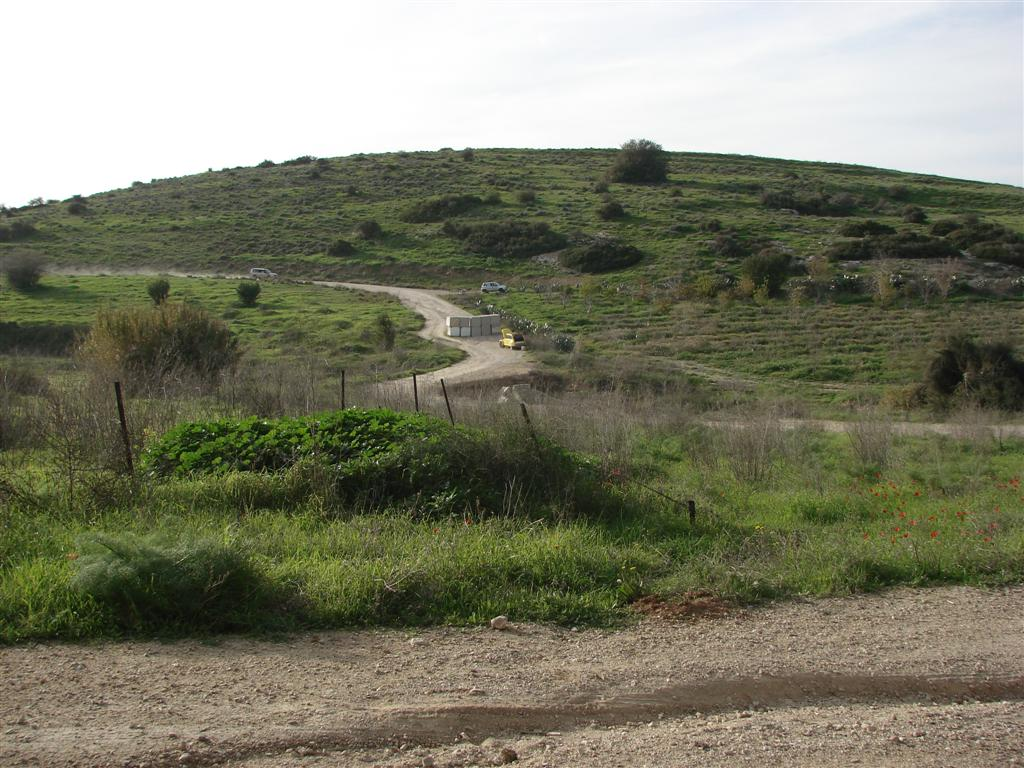 תל אגרה בנחל אדוריים